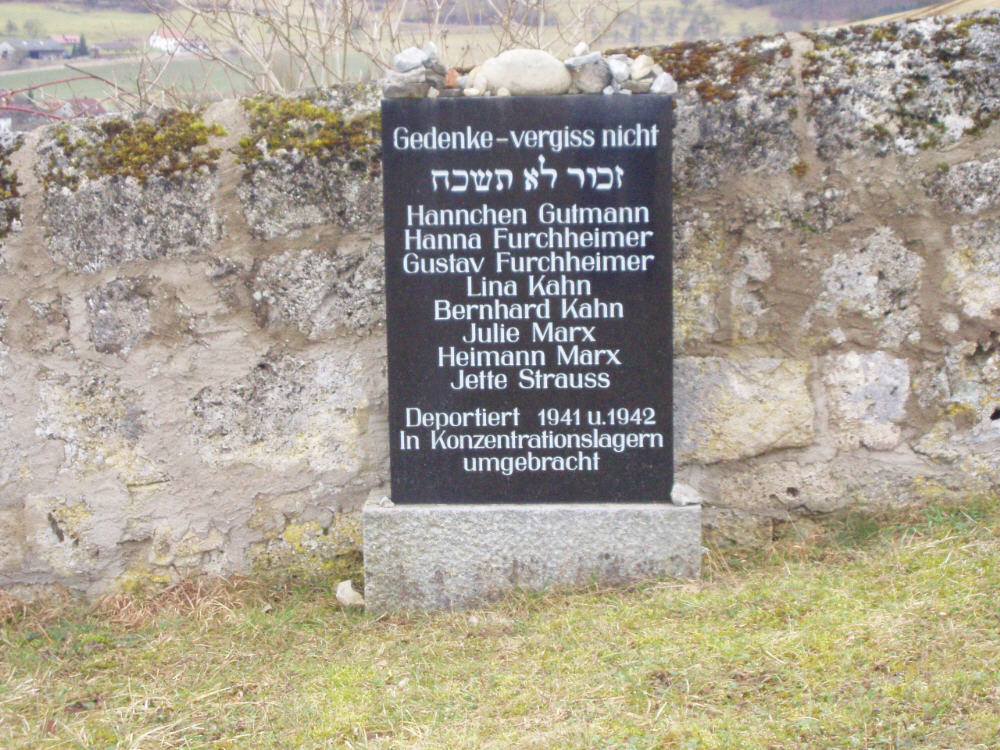 Gedenkstein für die letzten acht jüdischen Einwohner Hohebachs auf dem jüdischen Friedhof